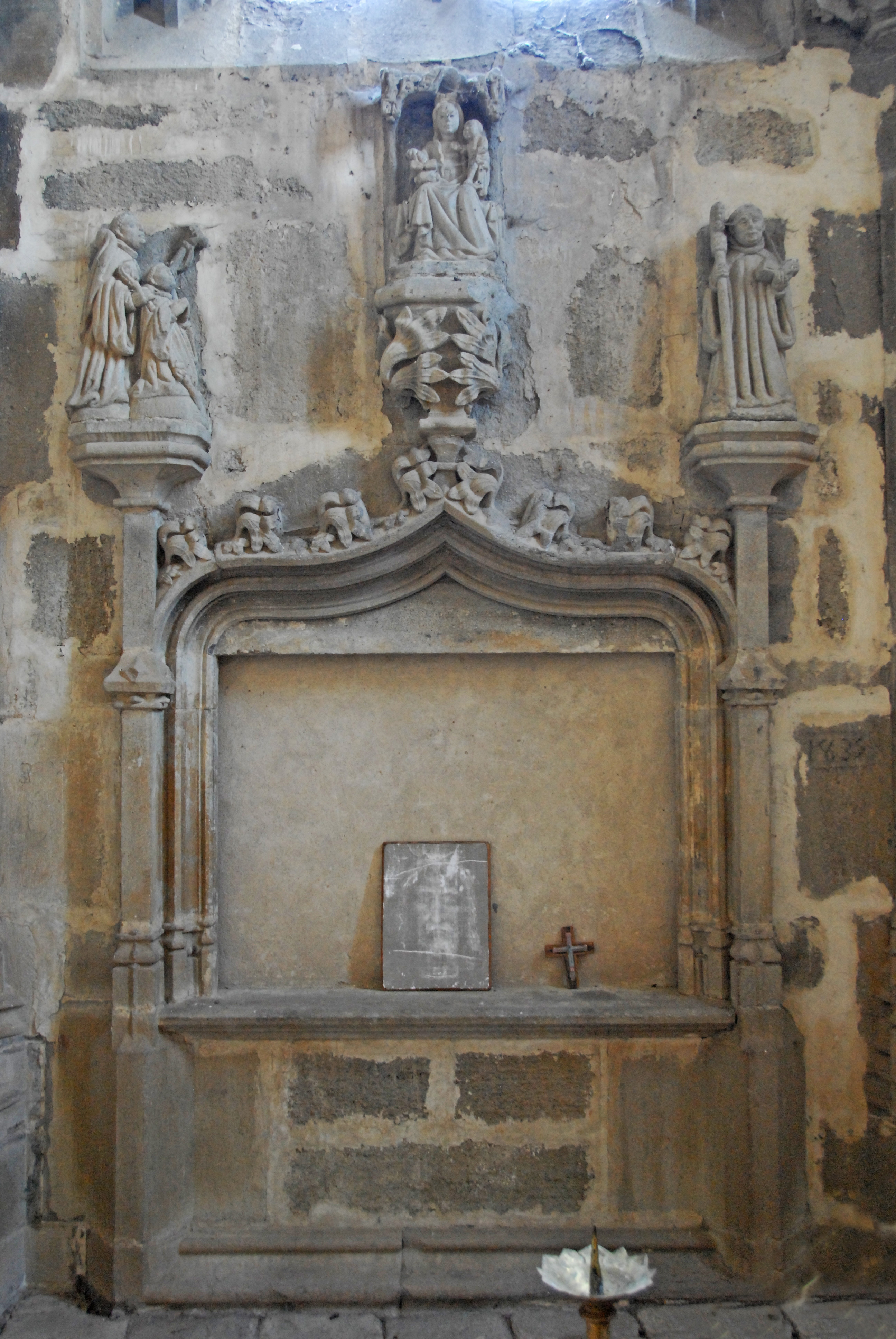 Chanteuges, Chapelle Ste.-Anne, Bestattungsnische (unten)